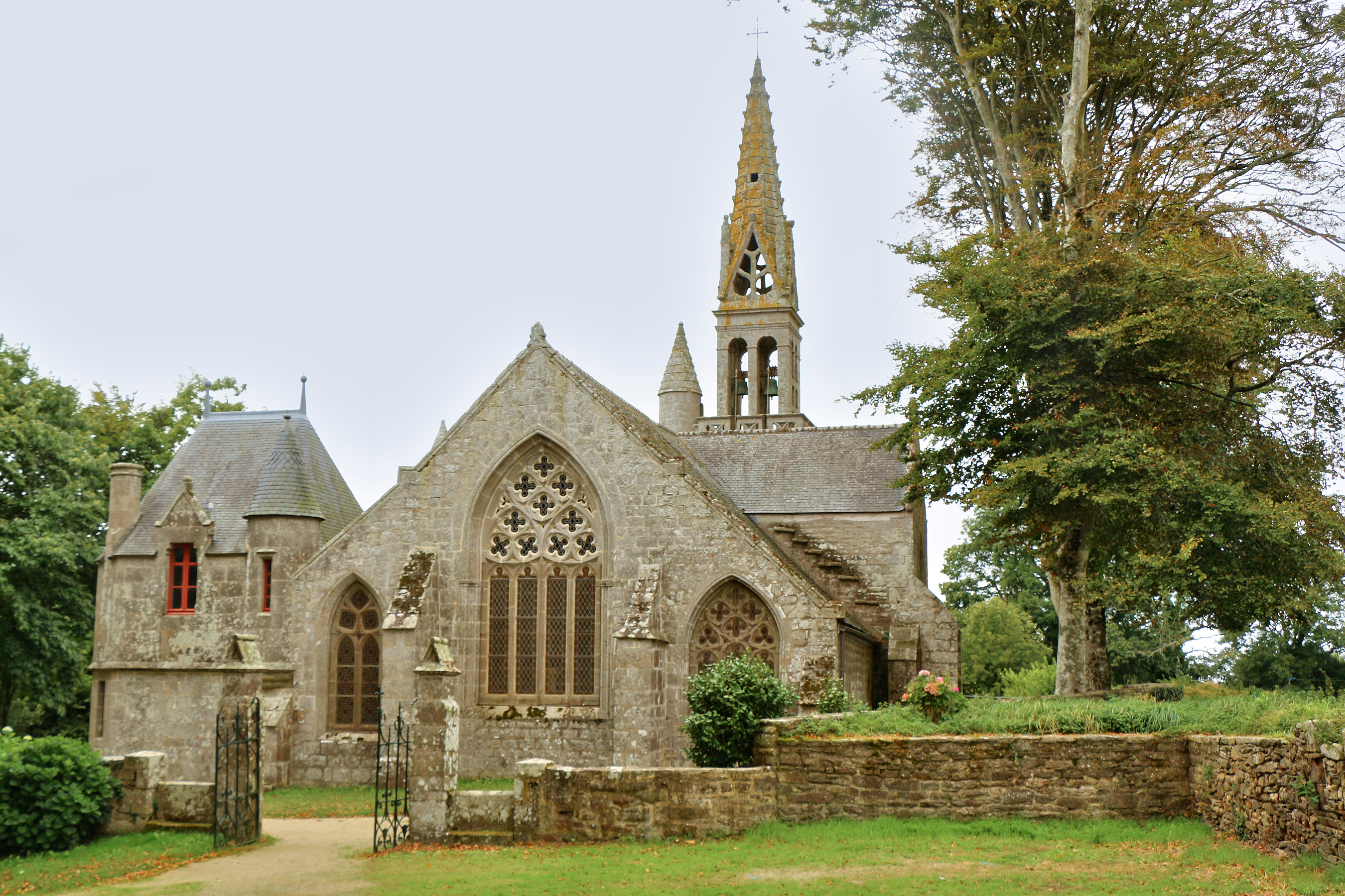 Chapelle Notre-Dame de Kérinec, Poullan-sur-Mer (29) .